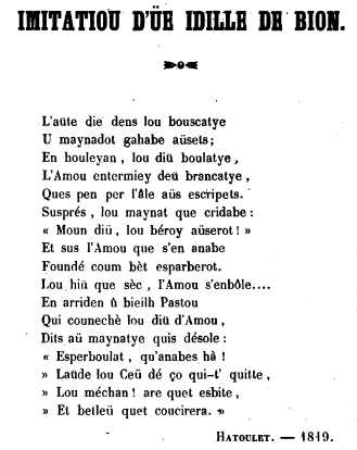 Poème béarnais de Jean-Auguste Hatoulet